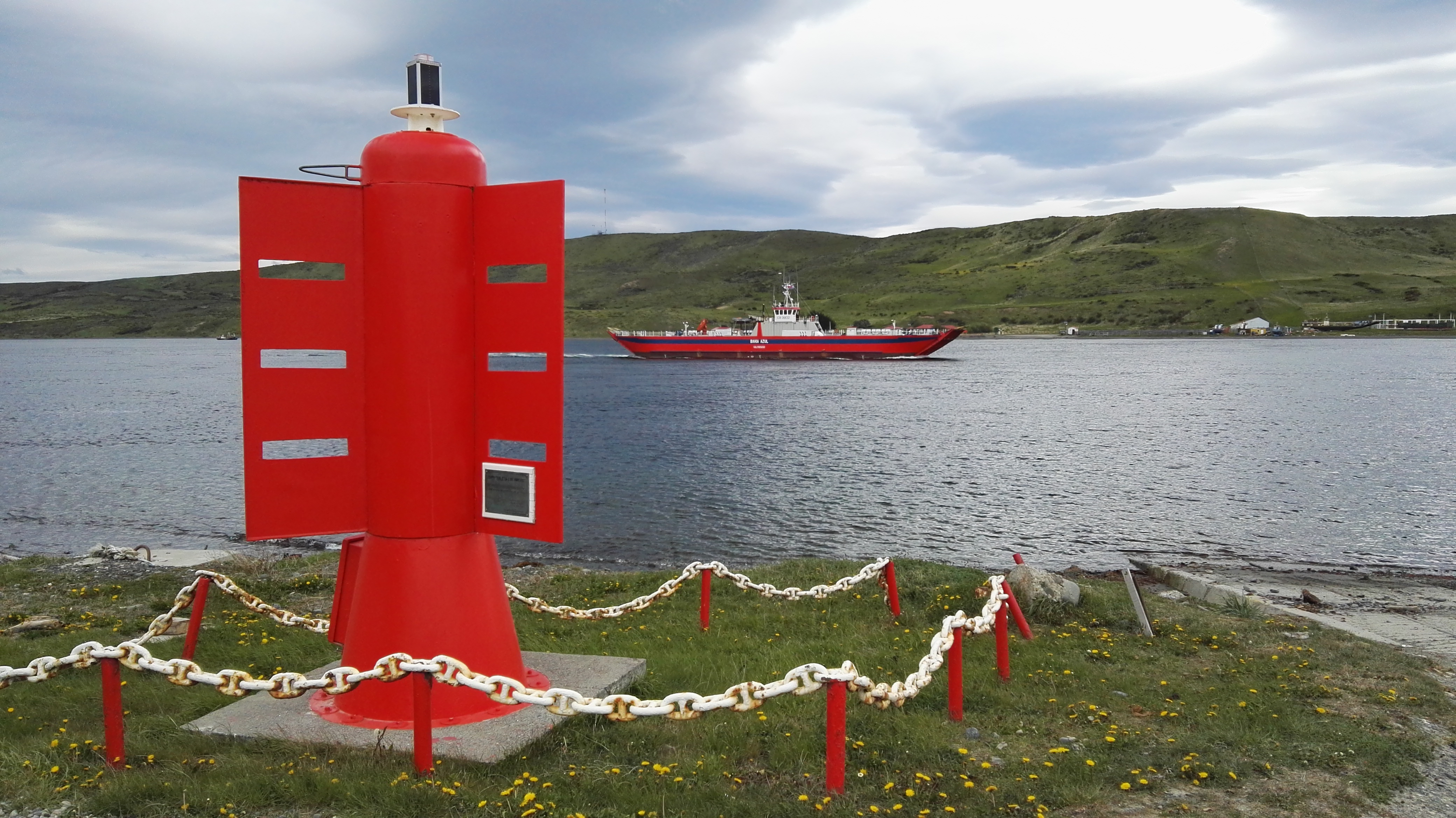 Fähre am Canal Fitzroy zur Isla Riesco in Chile